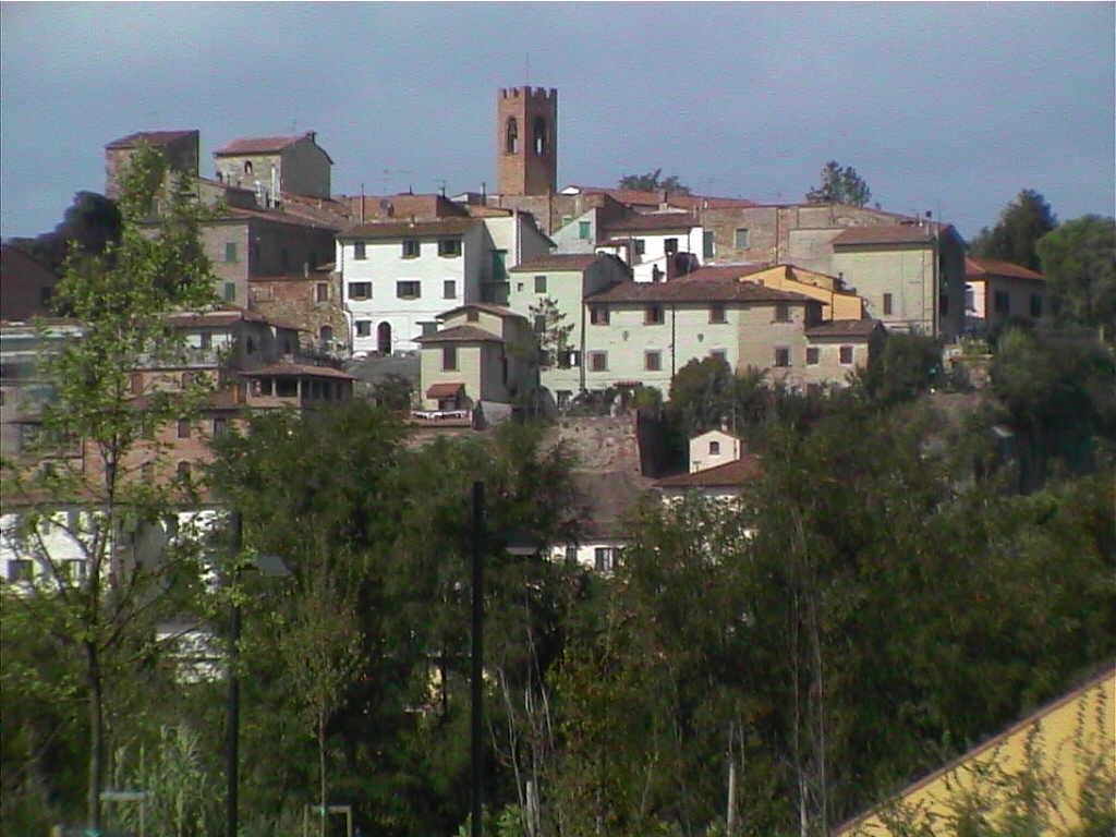 Capraia Fiorentina - panorama